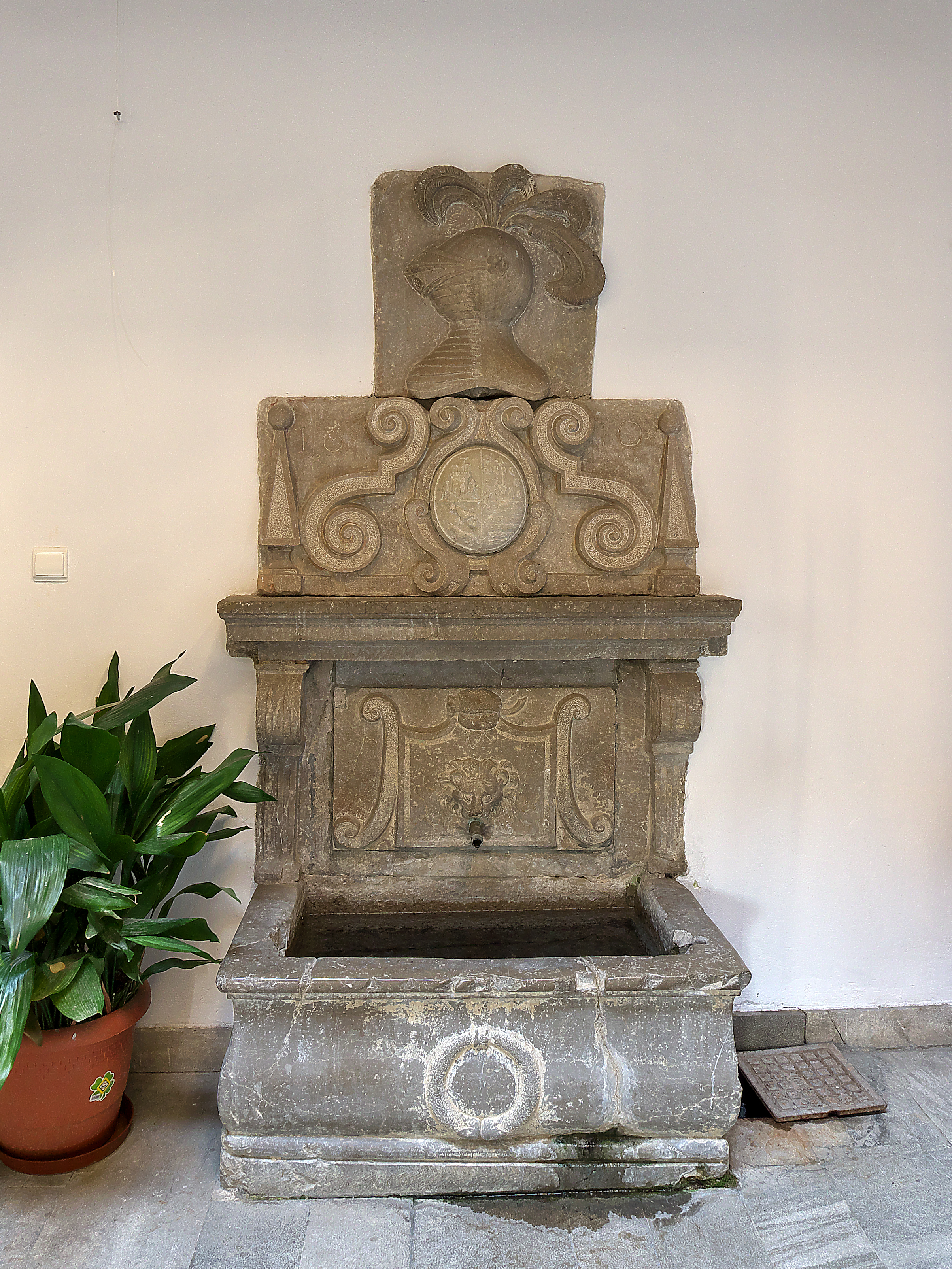 Pila (1610) con escudo heráldico en la casa de Alonso de Porras.